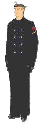 Rysunek został poprawiony i przedstawia obecnie stopień starszego marynarza, ze względu na nieużywanie już przez matów mundurów marynarskich.